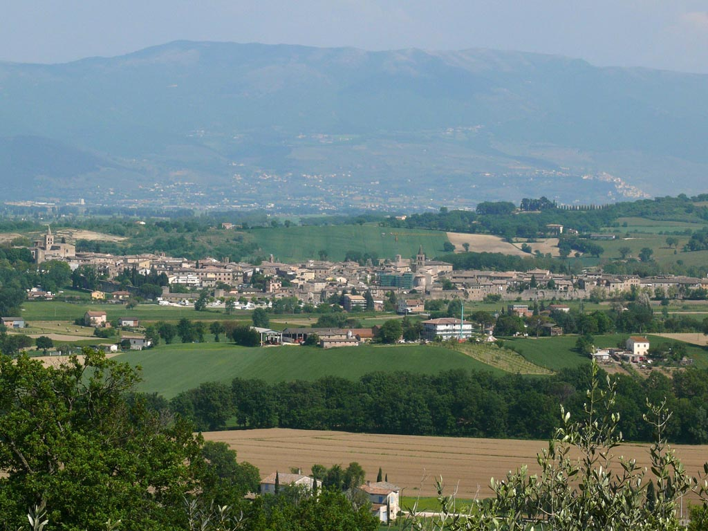 Bevagna, view